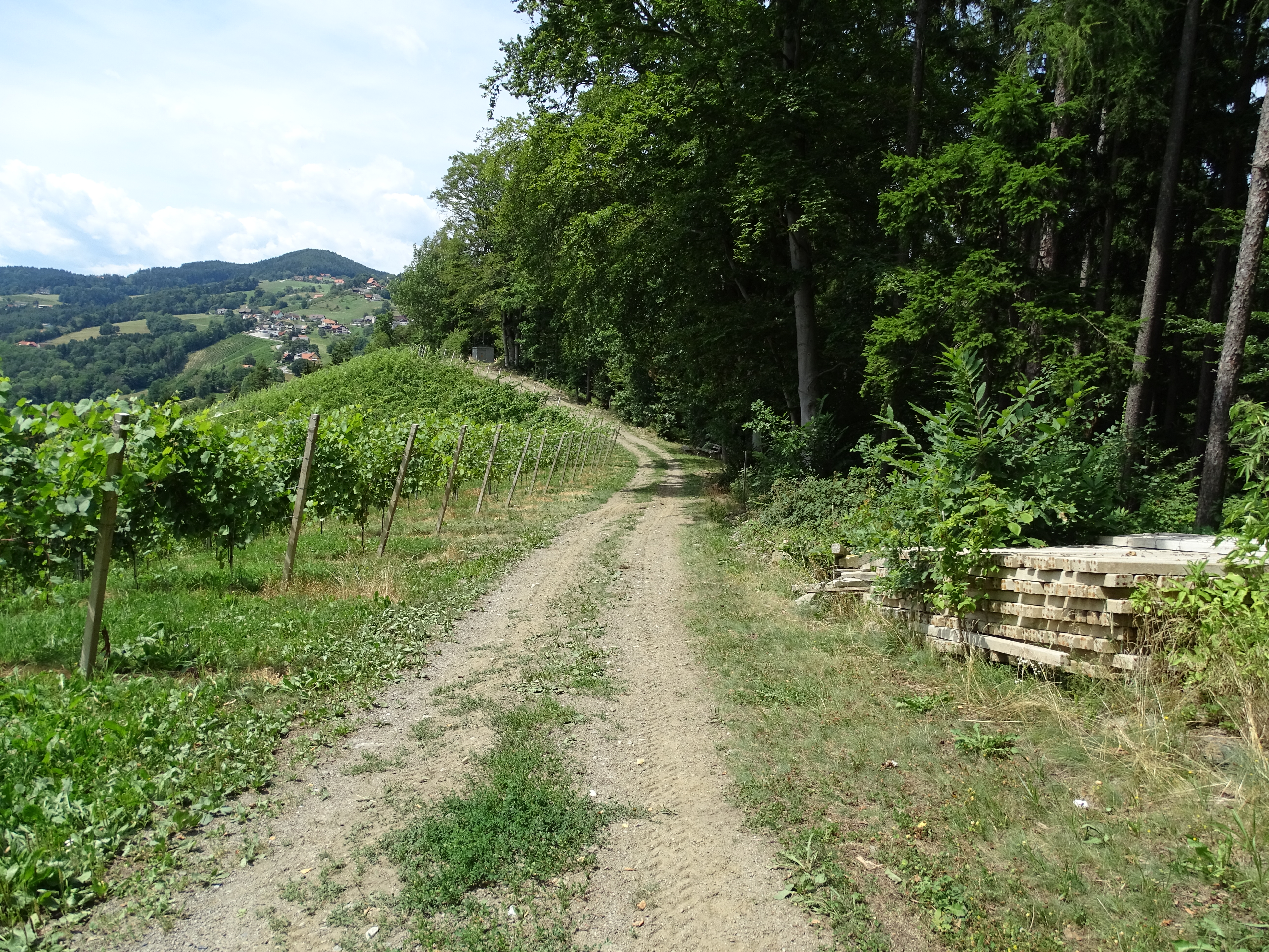 Blick auf den ehemaligen Standort der urgeschichtlichen Höhensiedlung am Dietenberg